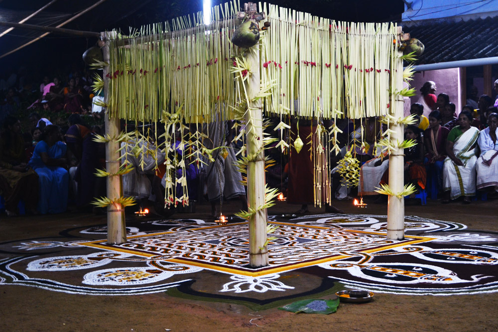 നാഗ കളത്തിന്റെ ചിത്രം